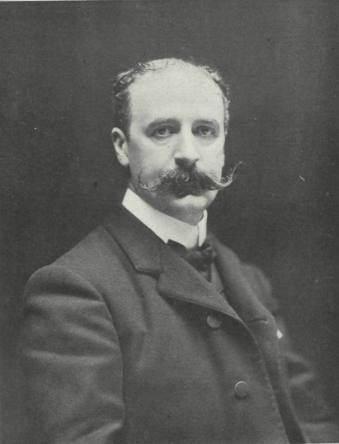 Fotografía de Manuel Durán y Bas, por Pablo Audouard